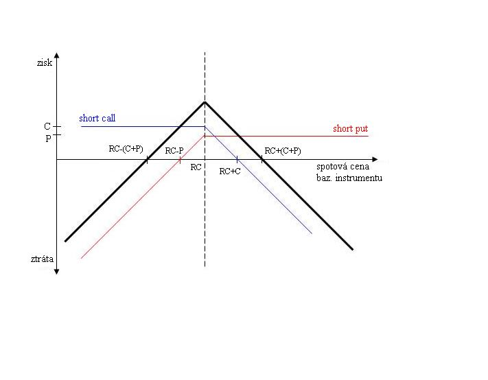 Česky: short straddle